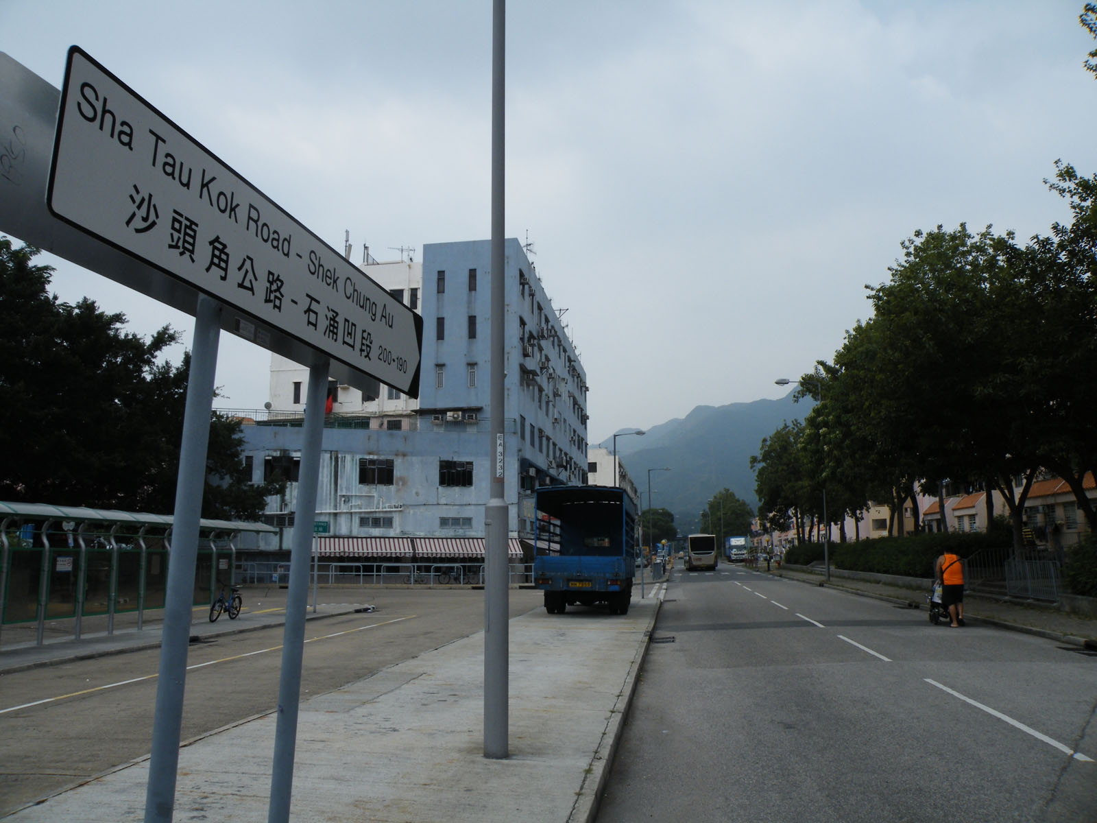 Sha Tau Kok Road - Shek Chung Au